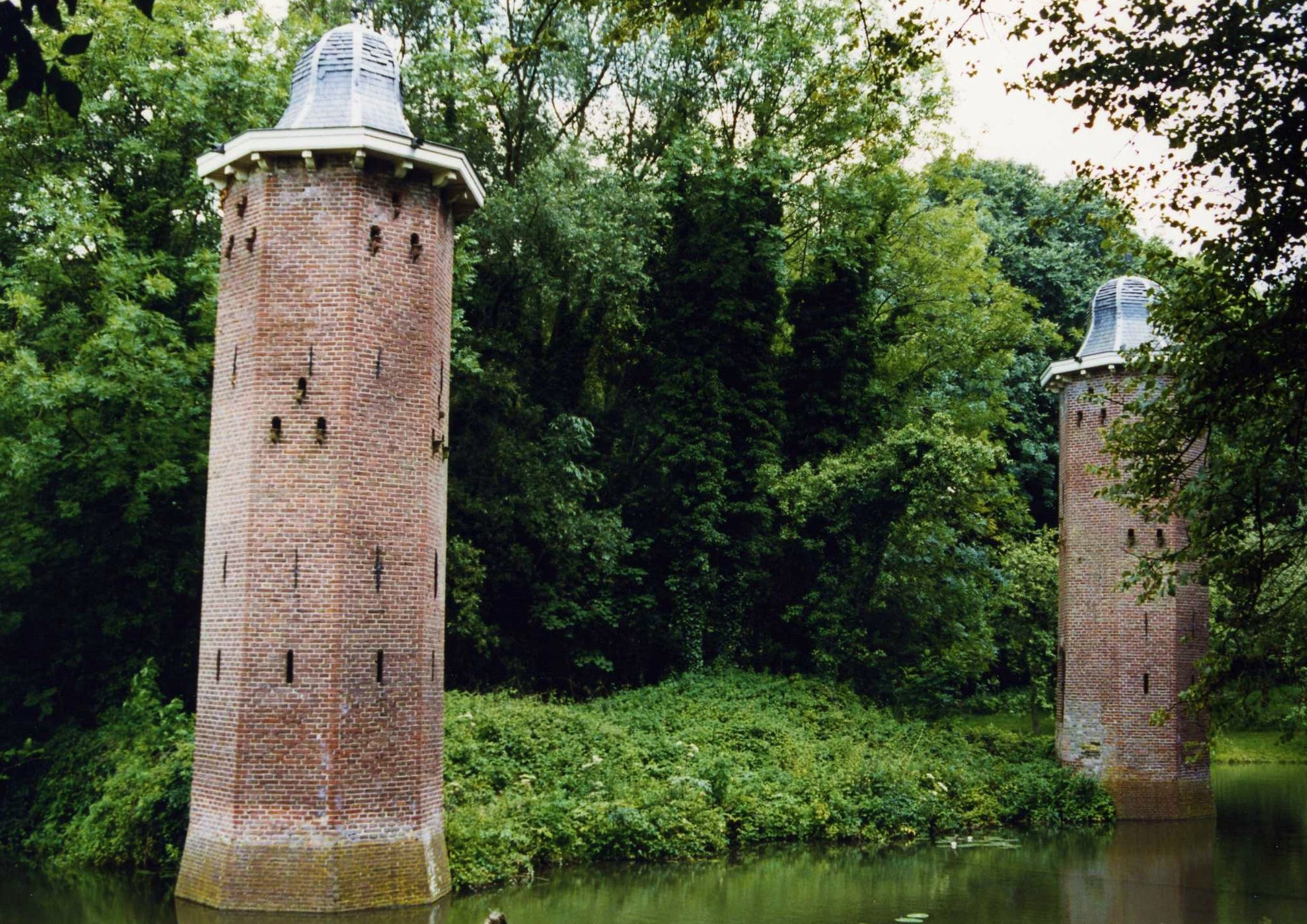 De restanten van kasteel Voorn te Utrecht.